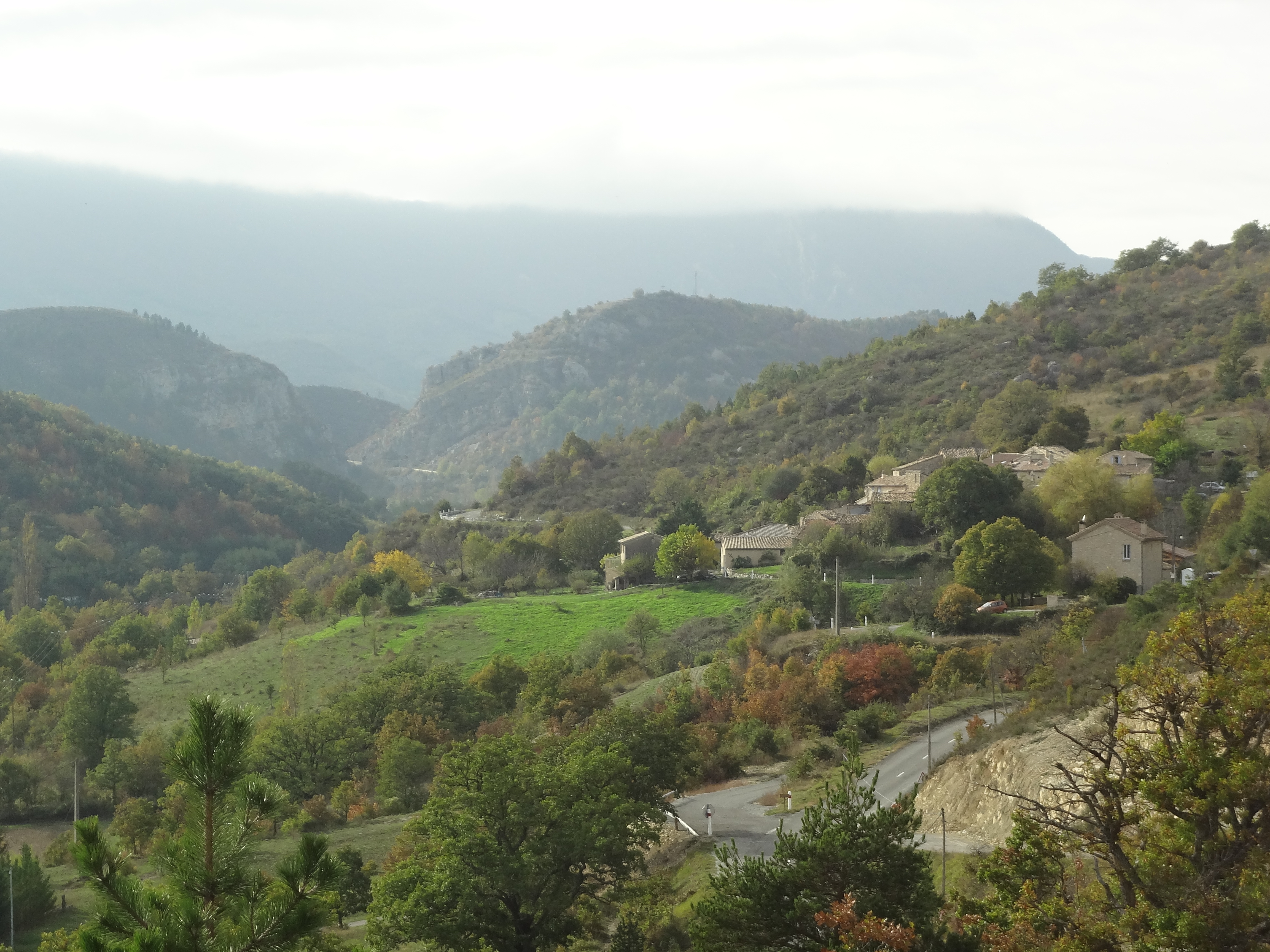 Village en hauteur et RD 946 (ancienne route nationale 546), vue de la cluse des Baumes, et montagne de Lure en fond dans la brume